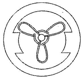 Símbolo da Especialidade de Electromecânicos da Marinha Portuguesa